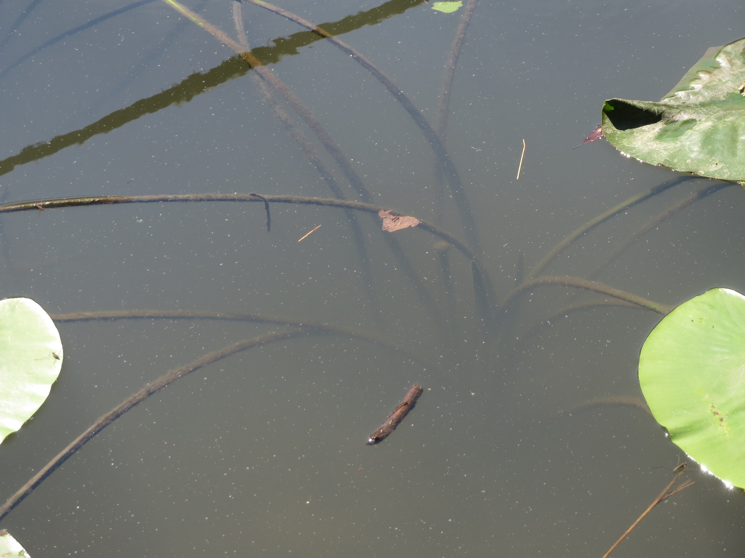 Weiße Seerose (Nymphaea alba) am Saaraltarm am Staden in Saarbrücken